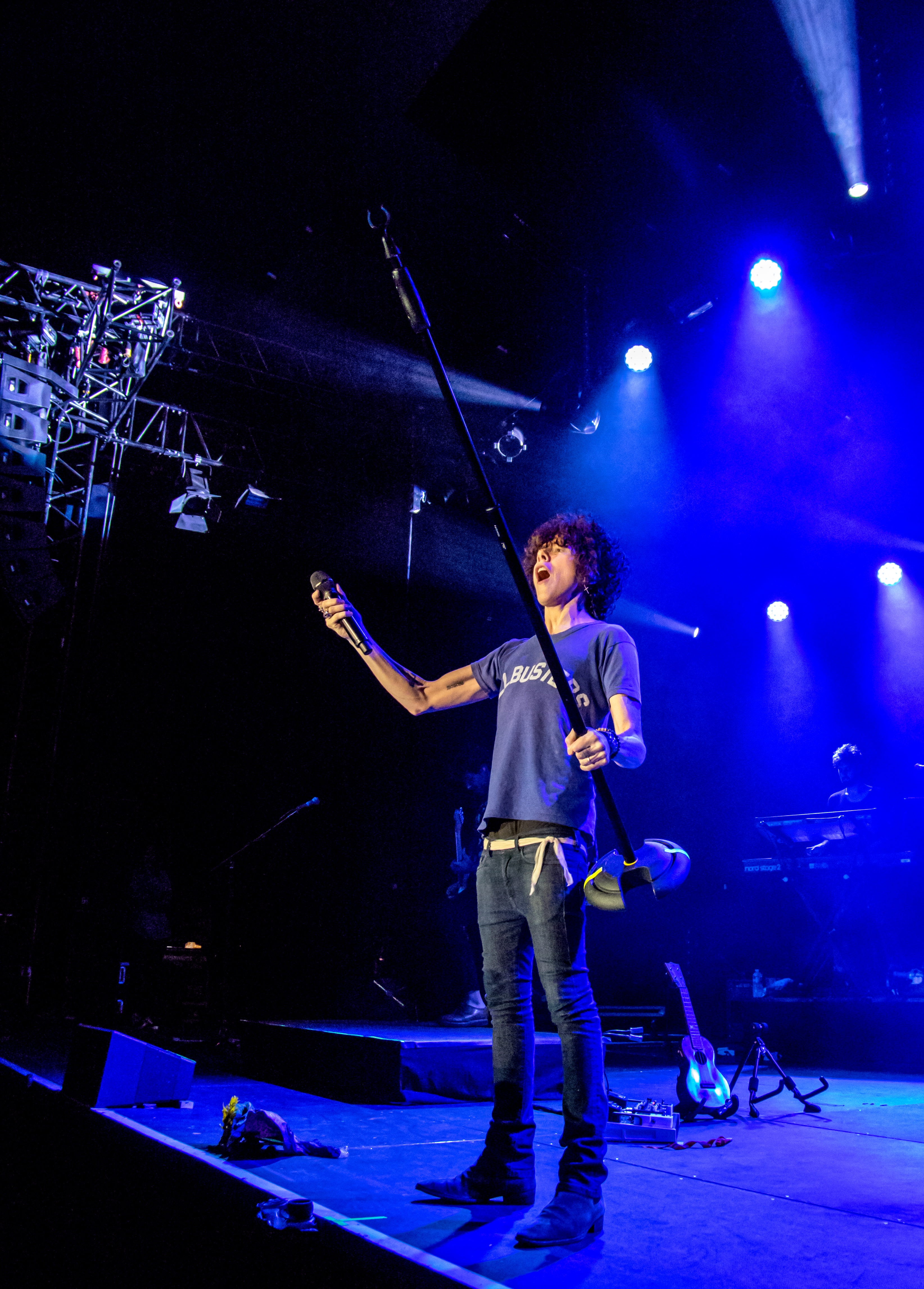 Bilder vom Zelt Musik Festival 2018 in Freiburg im Breisgau LP am 28.07.2018 im Zirkuszelt